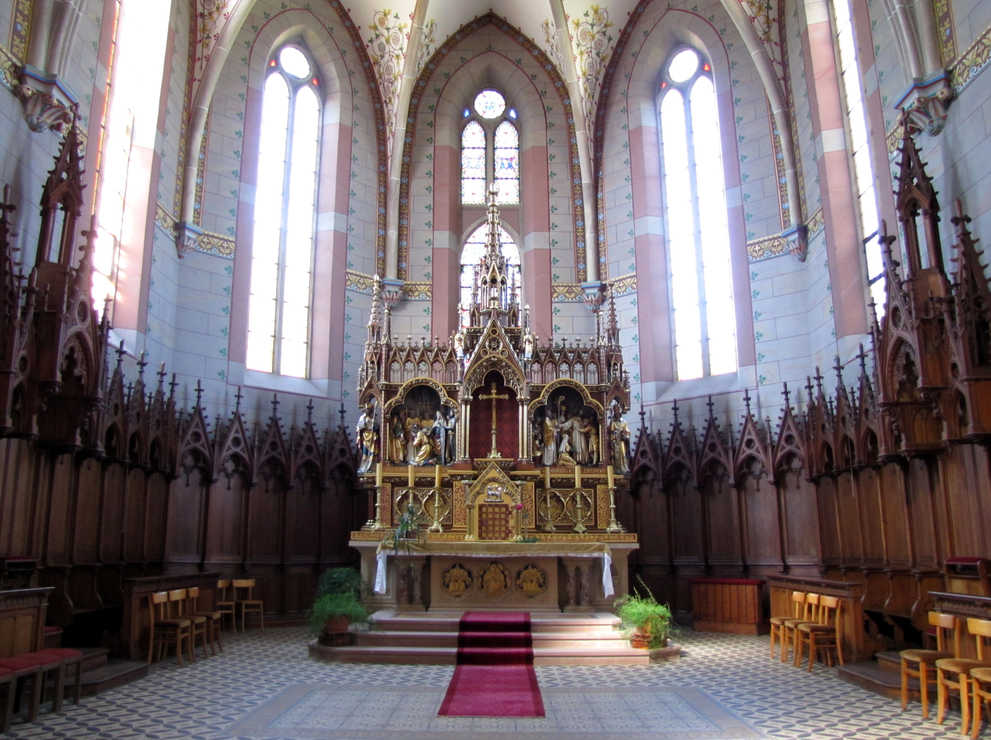 Alsace, Haut-Rhin, Église Saint-Martin (XIIIe-XIXe) de Pfaffenheim (PA00085583, IA68004314): Vue sur le chœur néo-gothique.Maître-autel (XIXe)